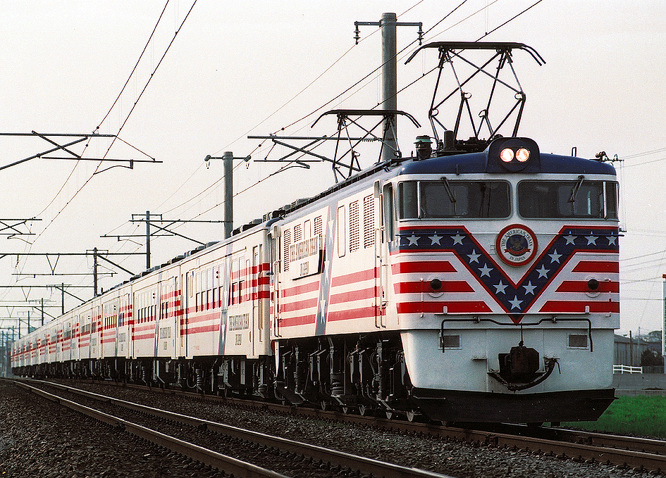 EF60 19けん引アメリカントレイン